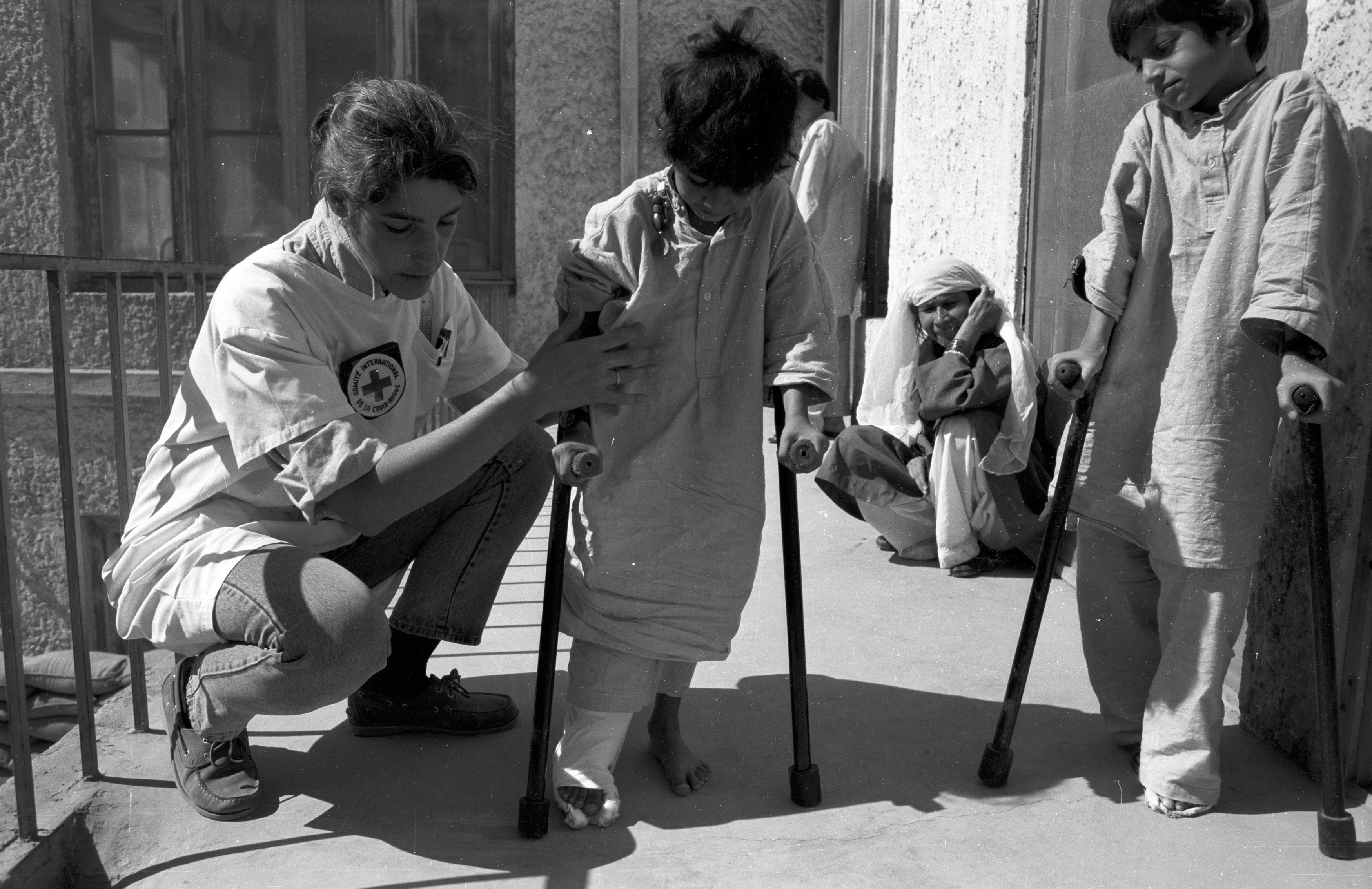 Фотографія зроблена 16 жовтня 1986 року в Афганістані працівниками МКЧХ.